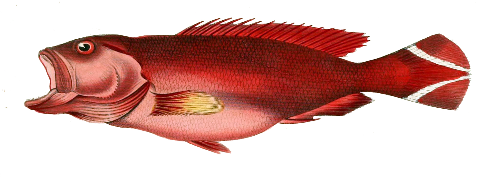 Cephalopholis urodeta